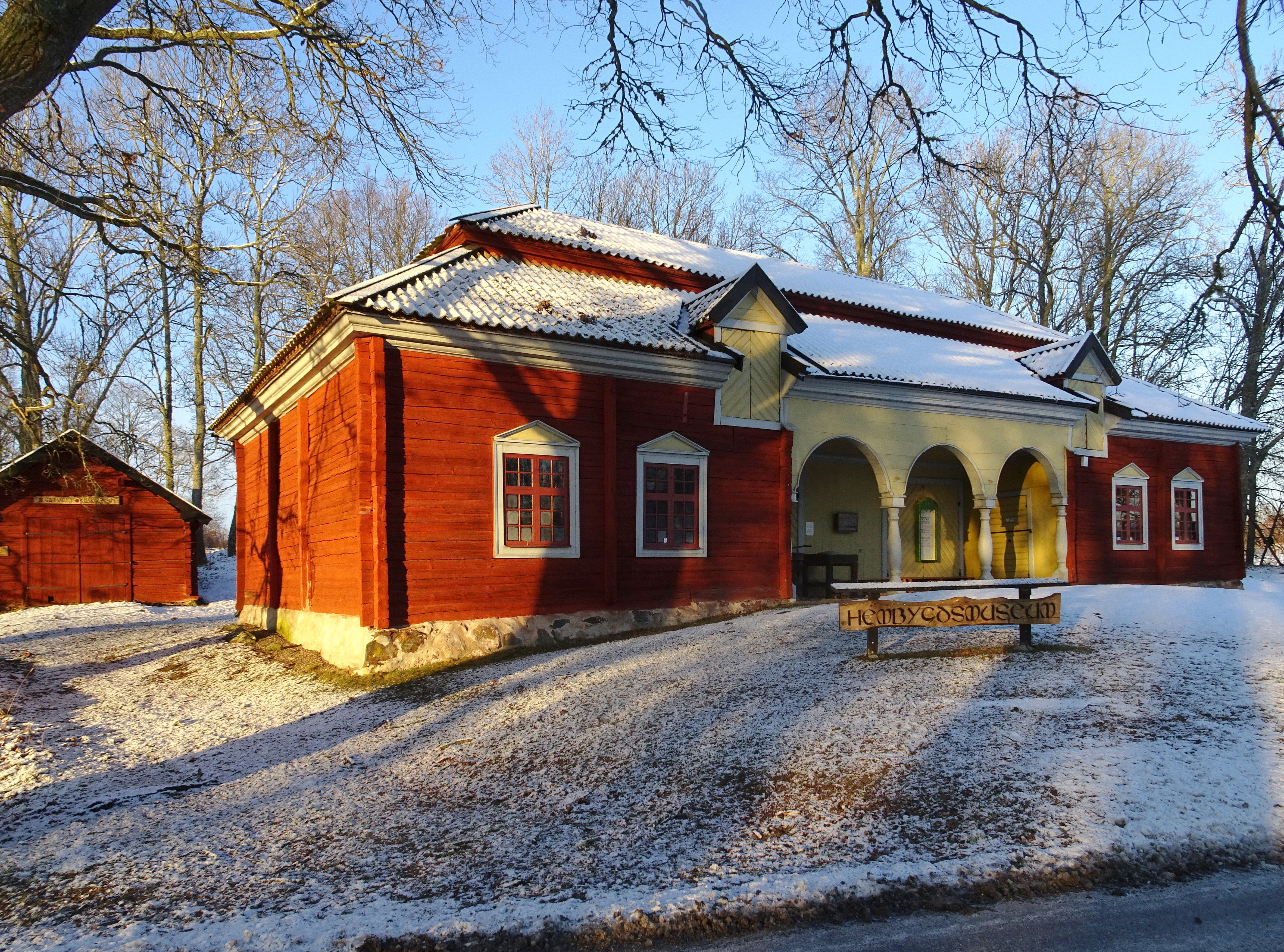 Katrineholms hembygdsmuseum på Stora Djuö (Stallet med museum)